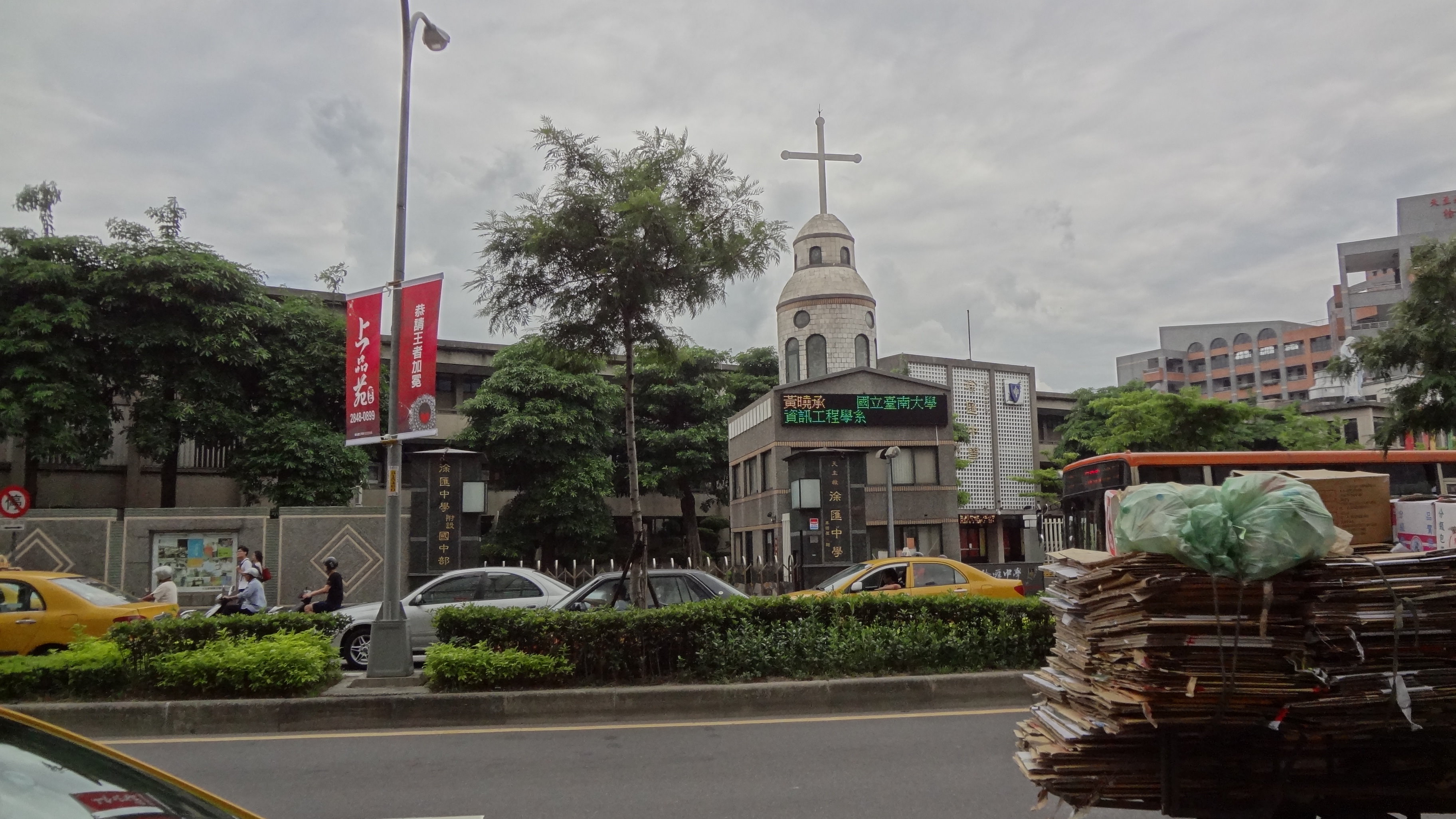 中文（台灣）: 天主教徐匯高級中學，位於臺灣新北市蘆洲區中山一路1號。